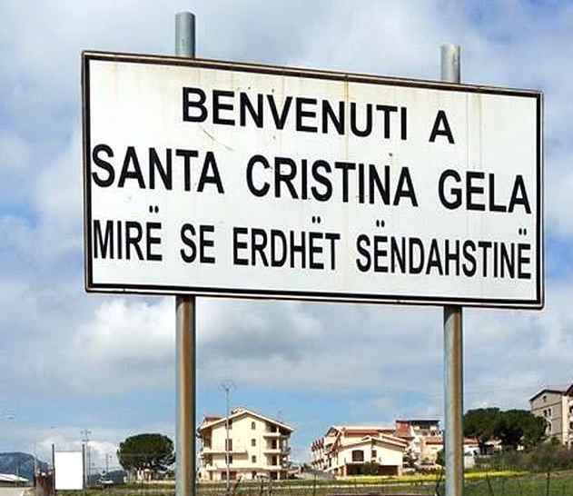 Cartello stradale bilingue a S. Cristina, provincia di Palermo, Sicilia IT.